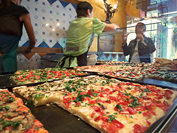 Pizza al taglio at Trastevere in Rome